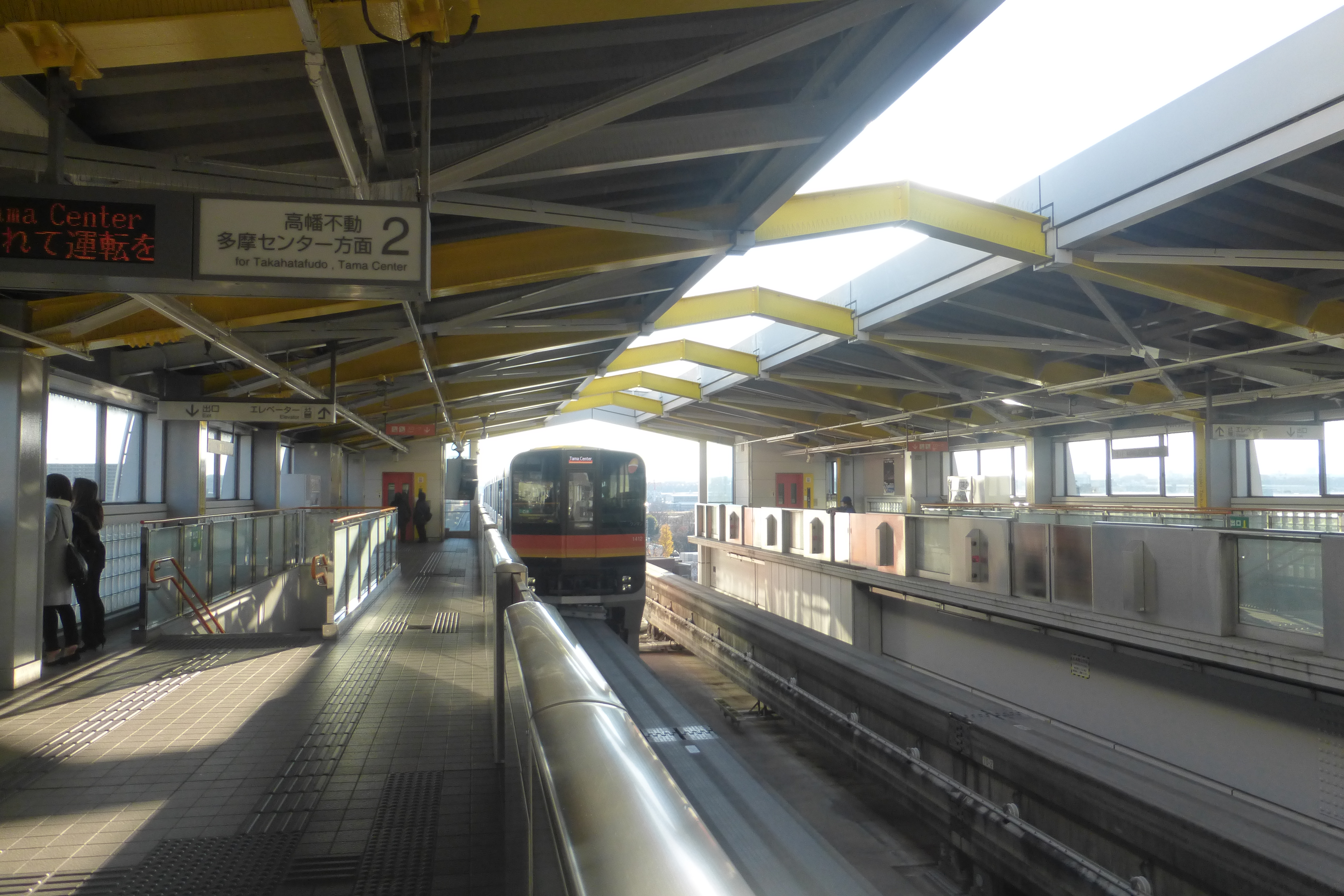 Shibasaki-Taiikukan Station platform (柴崎体育館駅のホーム)